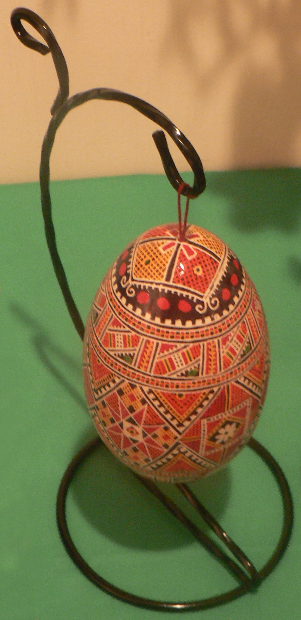 Ukrainian Easter Egg - Pysanka